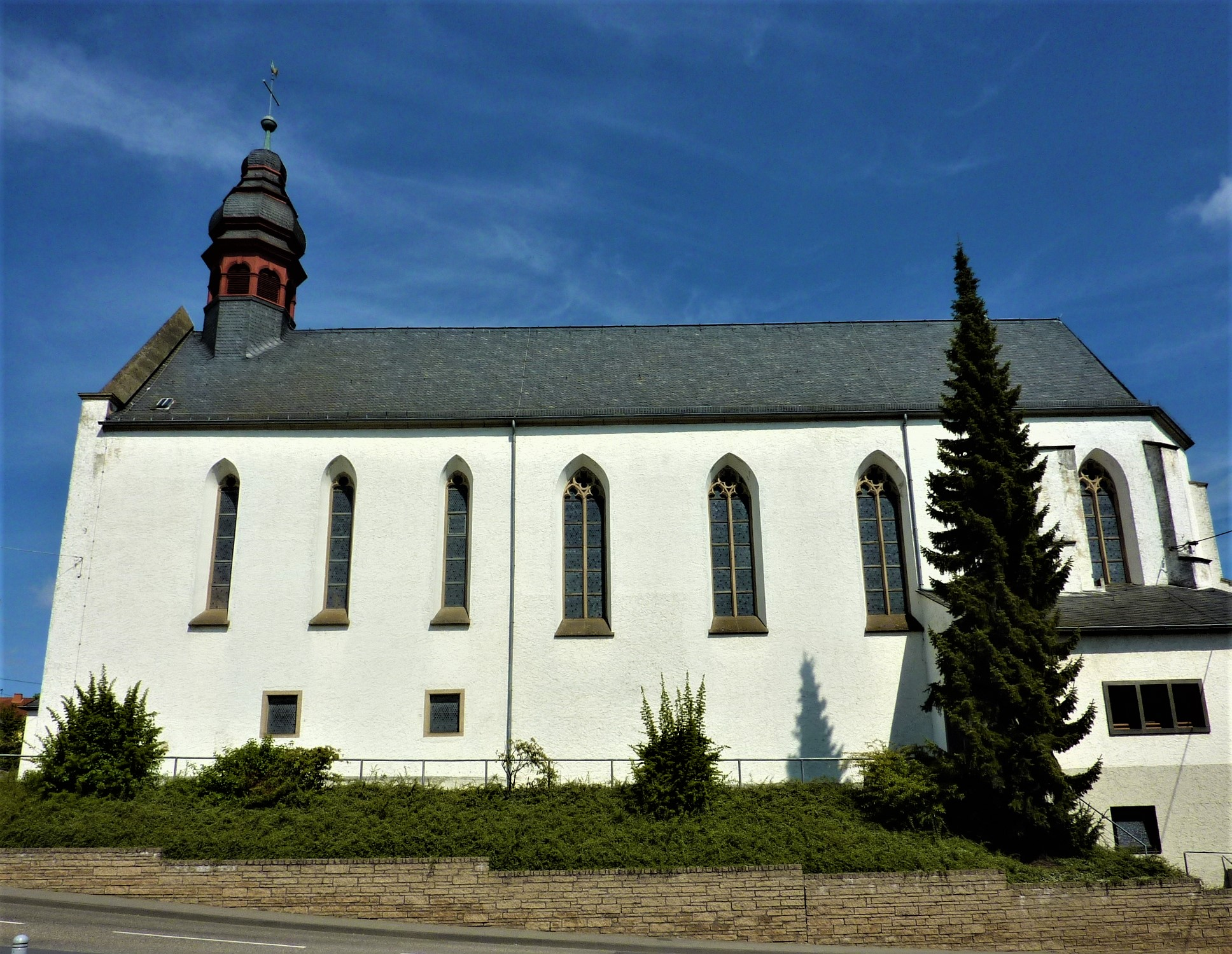 St. Katharina (St. Katharinen-Hilkerscheid)